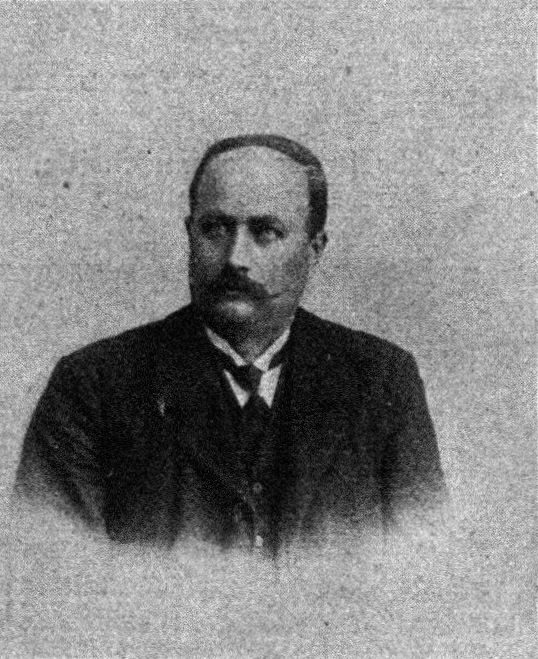 Österreichischer Politiker, Reichsratswahl 1907, Name siehe Dateiname